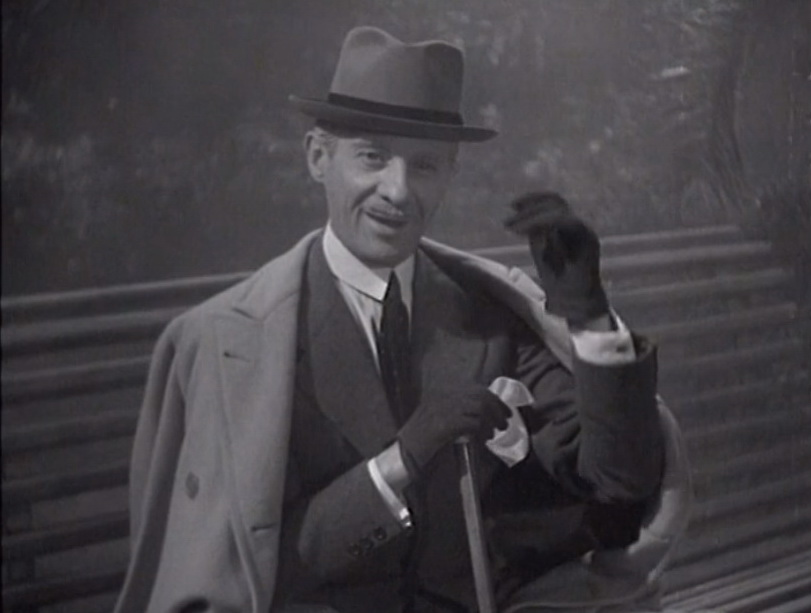 Screenshot dal film Un marito per il mese d'aprile (1941)